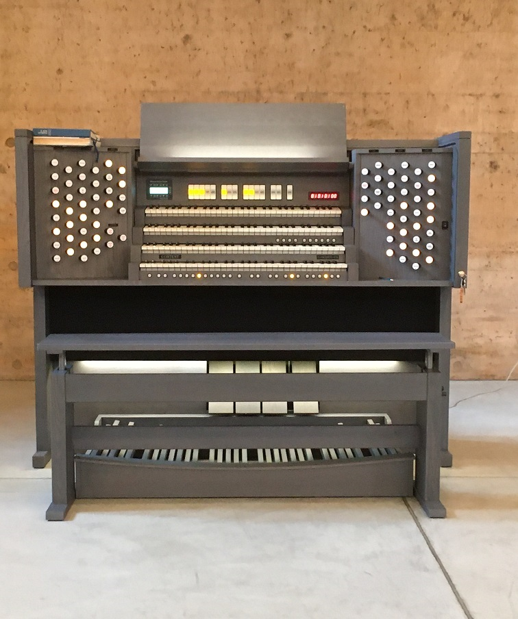 Kirche Martin Birmensdorf ZH Sampling-Orgel